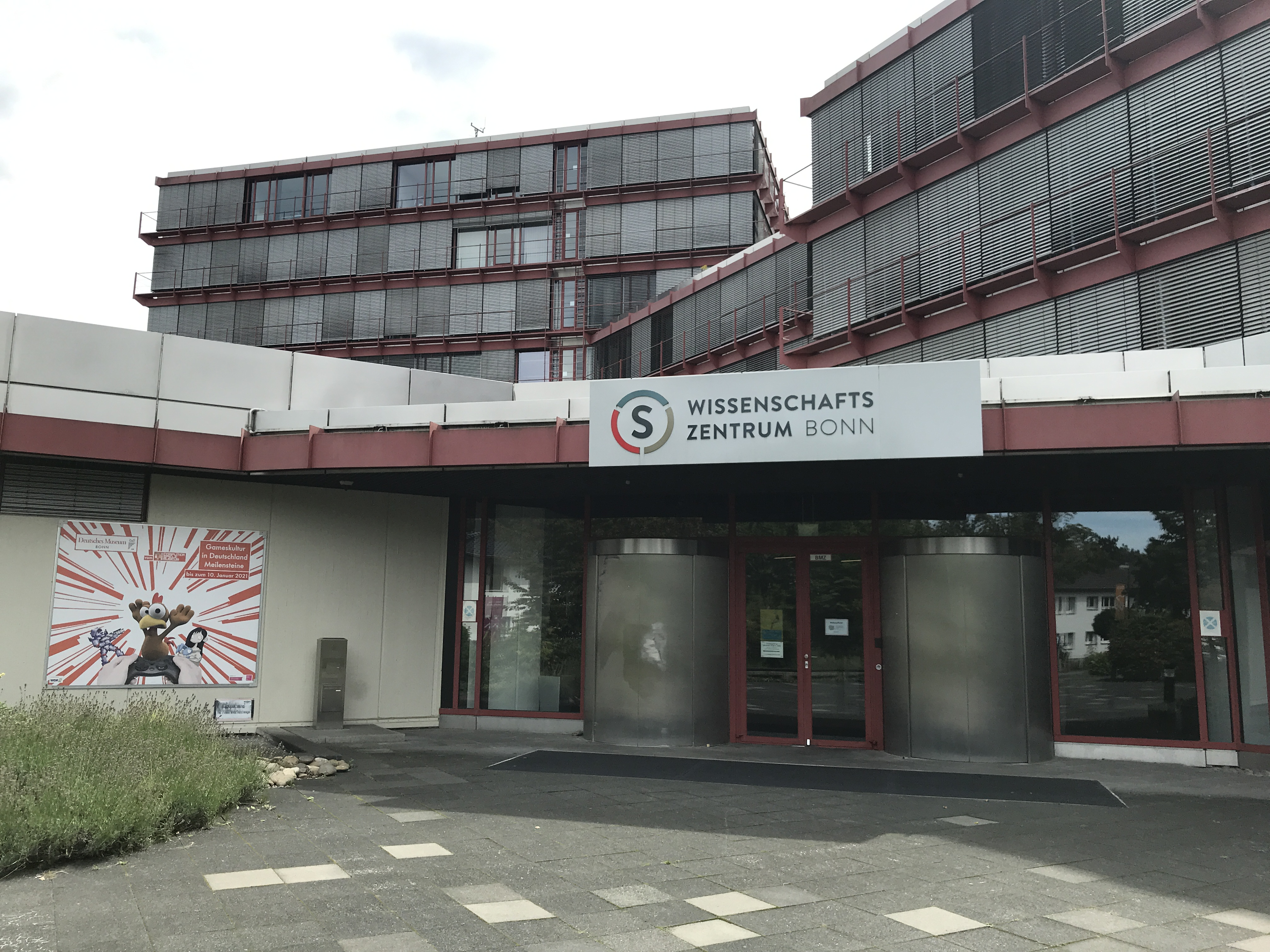 Wissenschaftszentrum Bonn 2020 Eingang